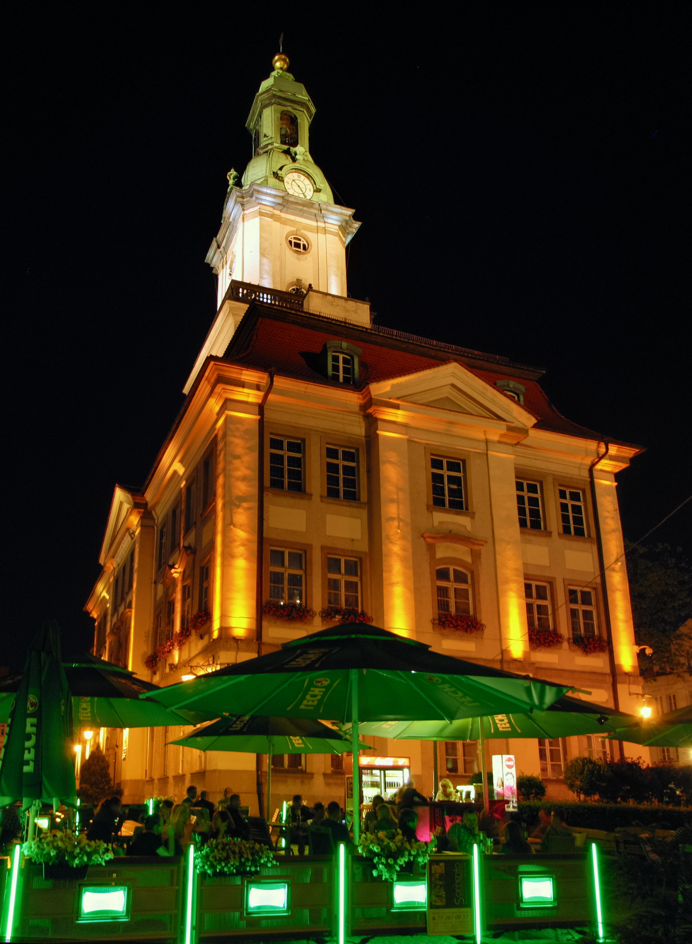 Jelenia Góra - Ratusz